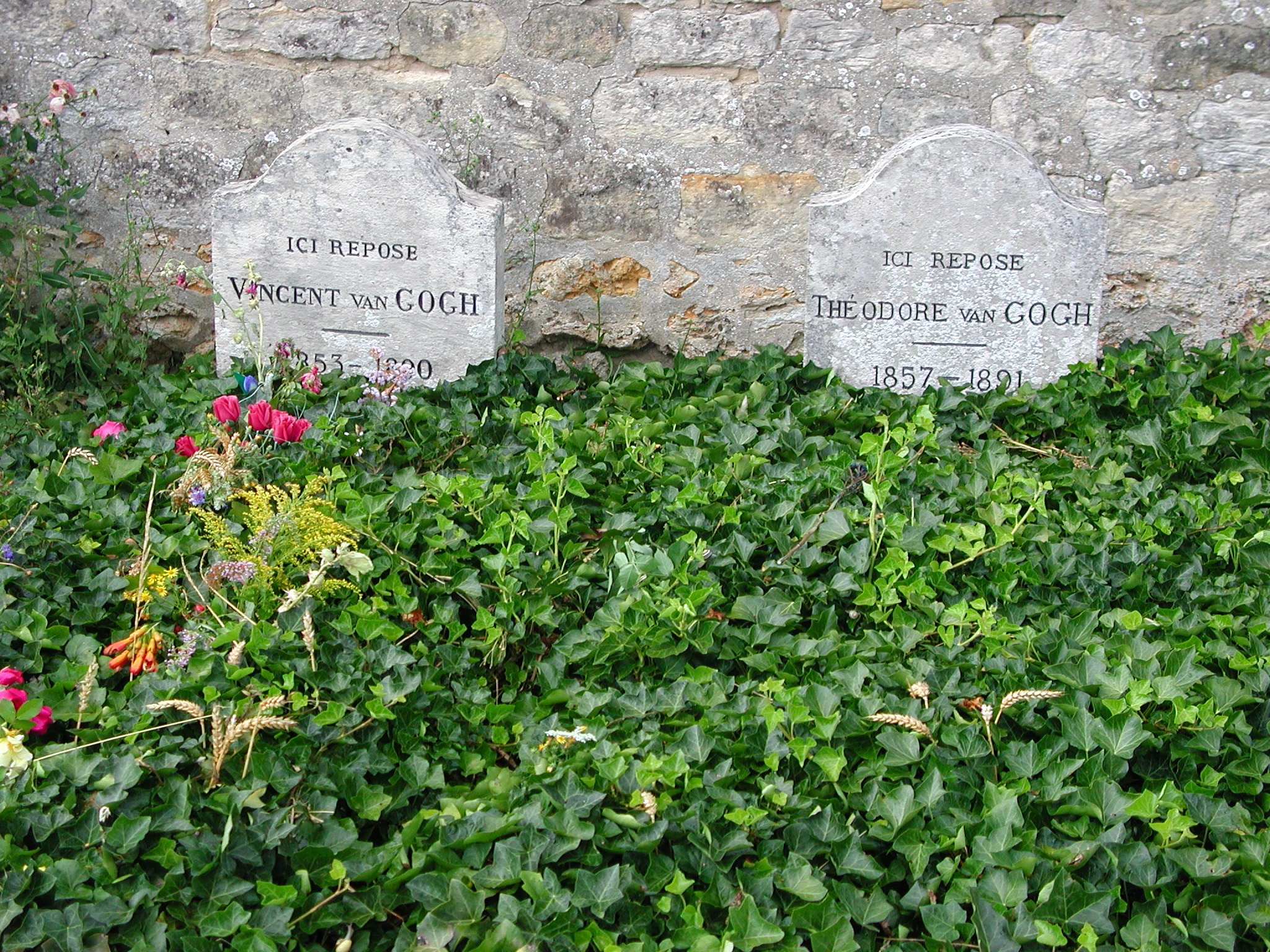 Grafstenen van Vincent van Gogh en Theo van Gogh